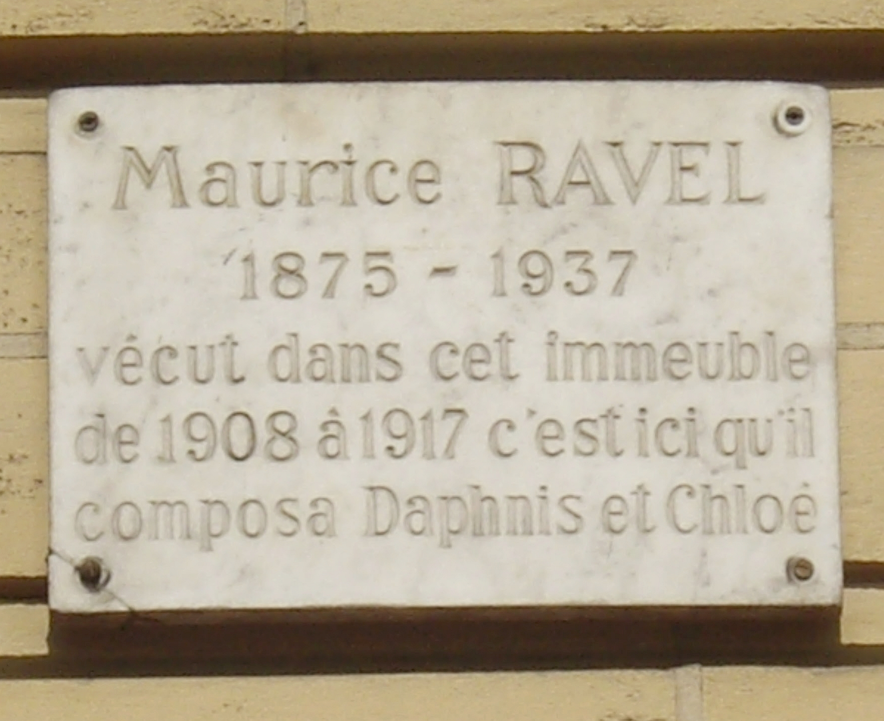 Plaque commémorative, 4 avenue Carnot, Paris 17e. « Maurice Ravel, 1875-1937, vécut dans cet immeuble de 1908 à 1917. C'est ici qu'il composa Daphnis et Chloé. »